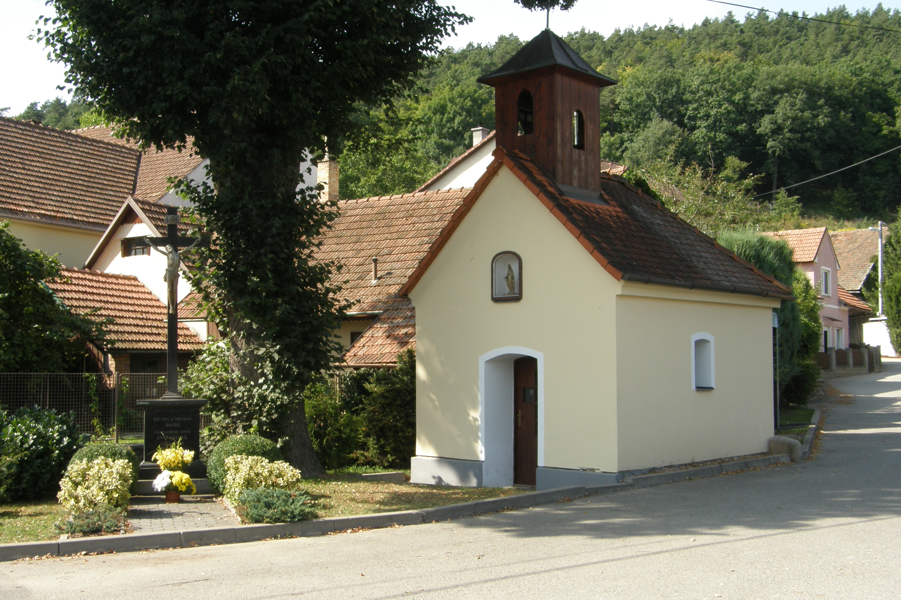 Kaple ve Svinošicích